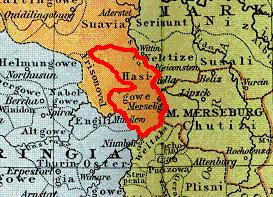 Lage des Hassegaus um 1000 n. Chr.